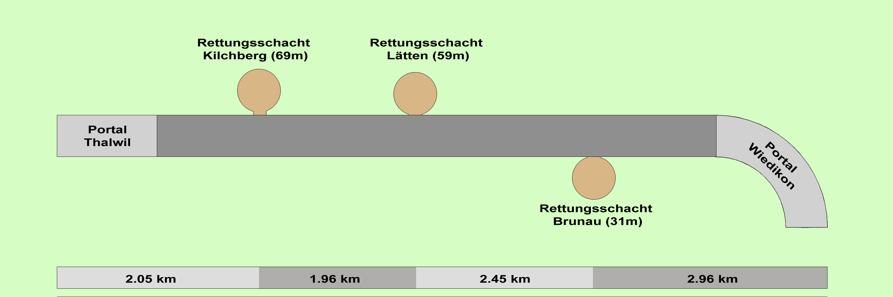 selber erstellte Grafik: Aufsicht Zimmerberg-Basistunnel mit Notausstiegen und deren Höhe sowie Längenangabe Tunnelabschnitte.